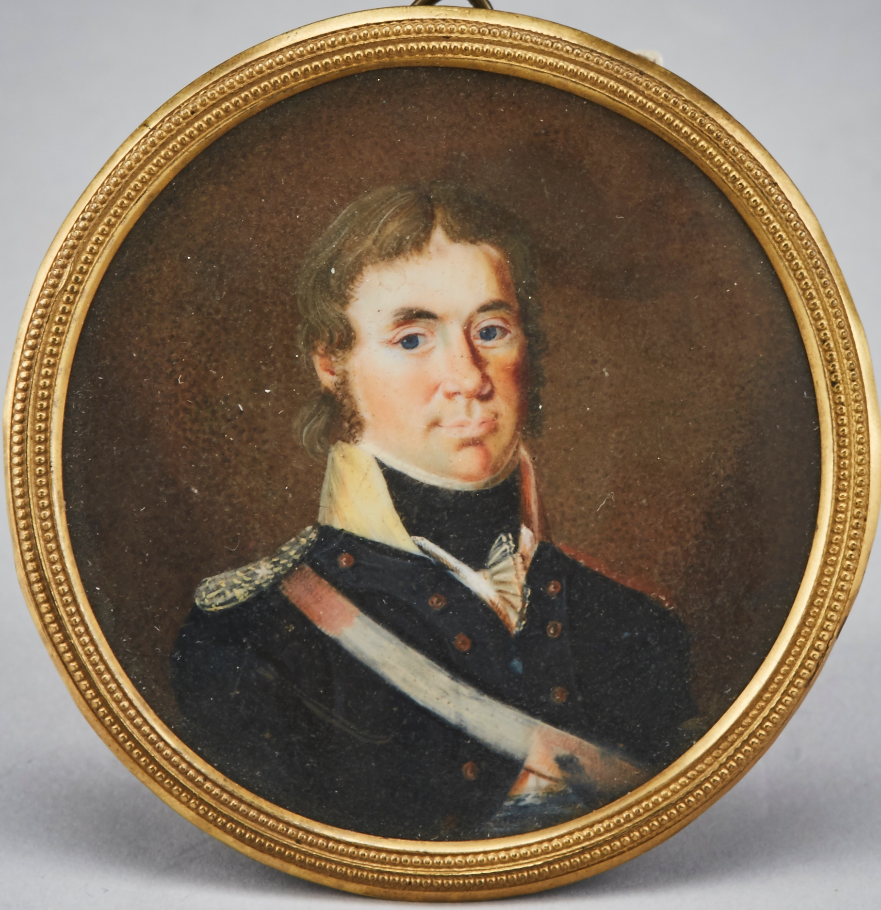 Porträtt av okänd man i svensk uniform m/1792 troligen Göta artilleriregemente, hans epåletter visar att han är underlöjtnant eller löjtnant. Målning av okänd konstnär ca 1800.